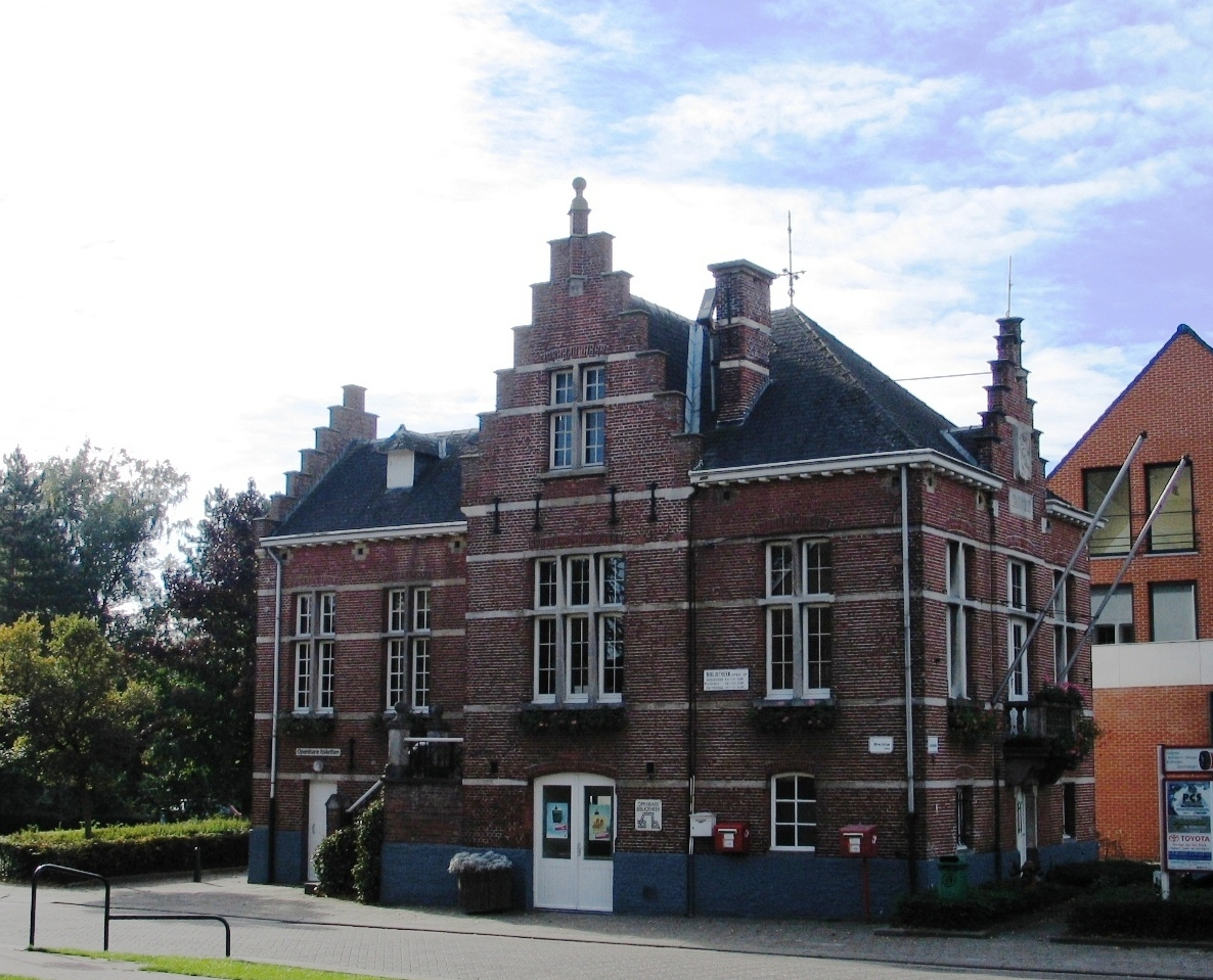 Het voormalig gemeentehuis van Loenhout